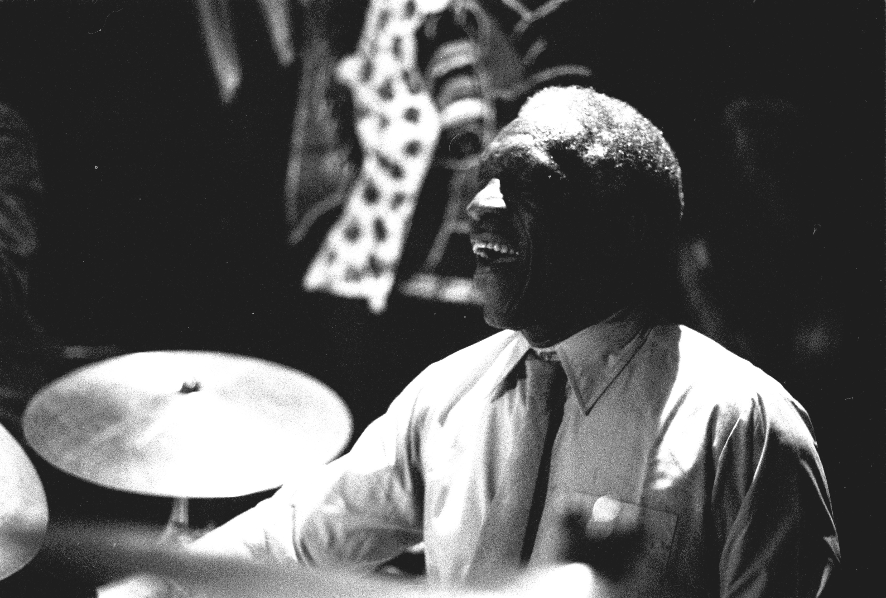 Le batteur américain de jazz Art Blakey en concert avec son orchestre "The Jazz Messengers" à Plougonven (Bretagne, France) en 1985.